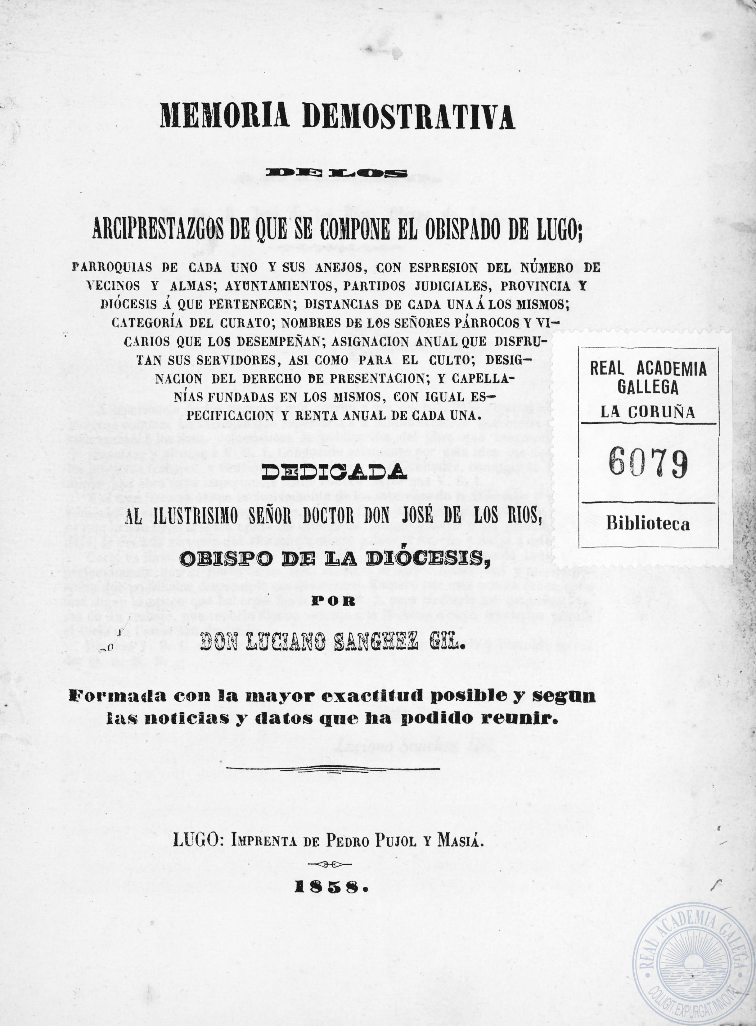 Memoria demostrativade losarciprestazgos de que se compone el obispado de Lugo;parroquias de cada uno y sus anejos, con espresión del número devecinos y almas; ayuntamientos, partidos judiciales, provincia ydiócesis á que pertenecen; distancias de cada una á los mismos;categoría del curato; nombres de los señores párrocos y vicariosque los desempeñan; asignación anual que disfrutansus servidores, asi como para el culto; designacióndel derecho de presentación; y capellaníasfundadas en los mismos, con igual especificacióny renta anual de cada una.